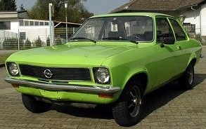 Motiv: Opel Ascona A, Bj. 1974; Kamera: Nikon 885